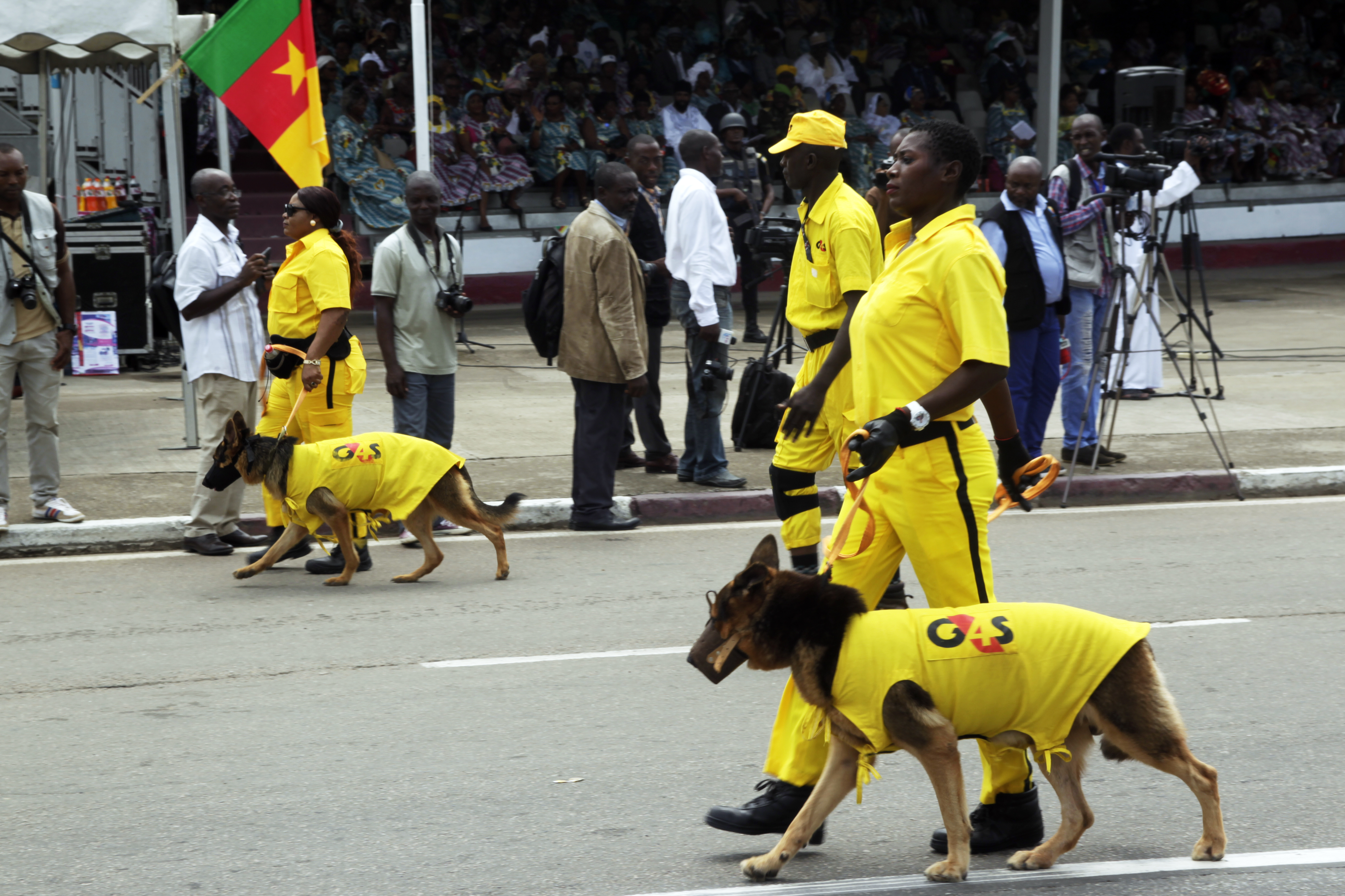 le défilé des agents de sécurité avec des chiens habillés This is an image with the theme "Africa on the Move or Transport" from: Cameroon